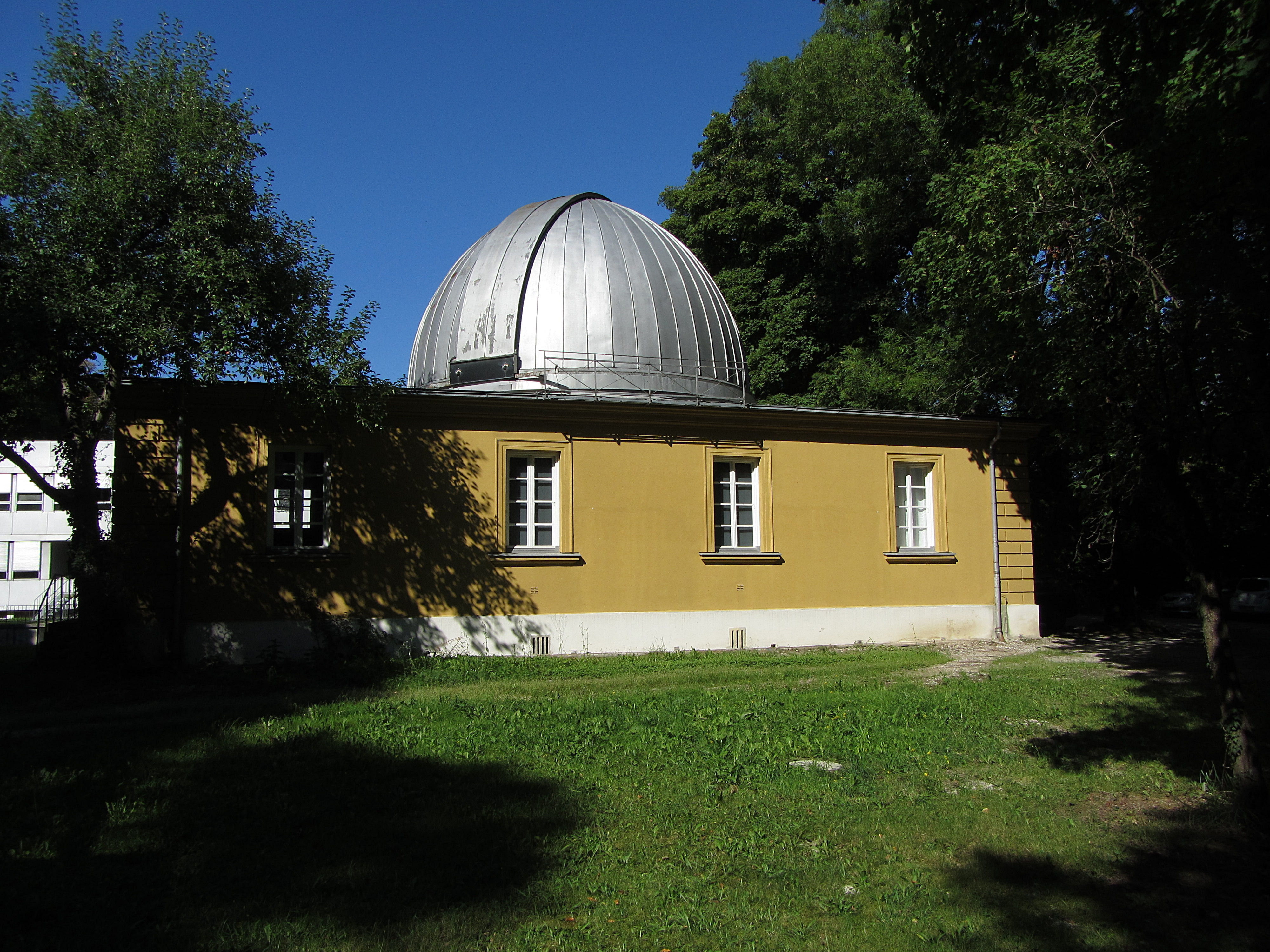 Alte Teleskopkuppel bei der Universitätssternwarte München, sie enthält ein von Fraunhofer entworfenes Linsen-Teleskop.This is a photograph of an architectural monument.